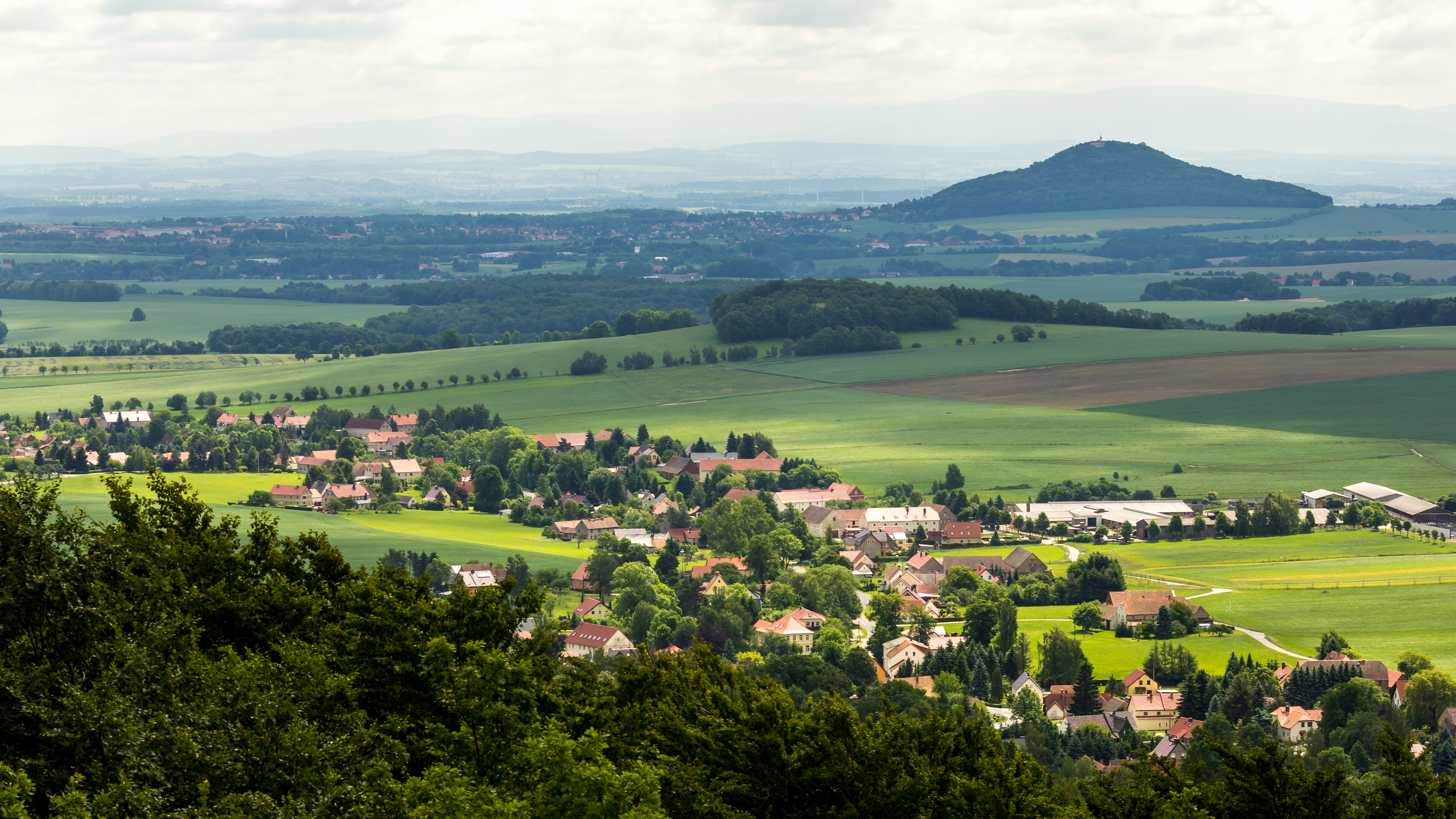 Königshain, Blick vom Aussichsturm auf dem Hochstein. Im Hintergrund die Landeskrone